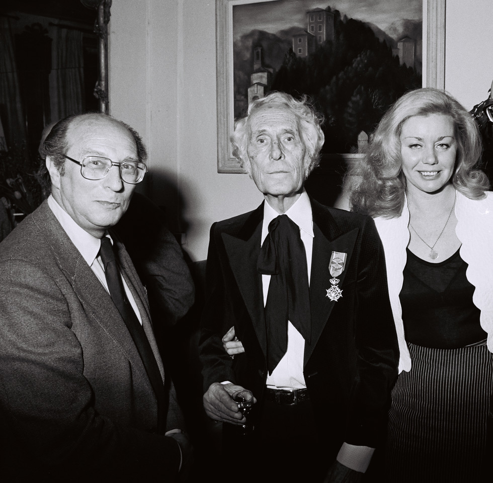 Carel Willink tijdens benoeming officier van Oranje Nassau. Bij gelegenheid van de 80ste verjaardag van Carel Willink , waar hij thuis door wethouder Polak (links), een officierslintje opgespeld kreeg. Rechts Sylvia Willink.